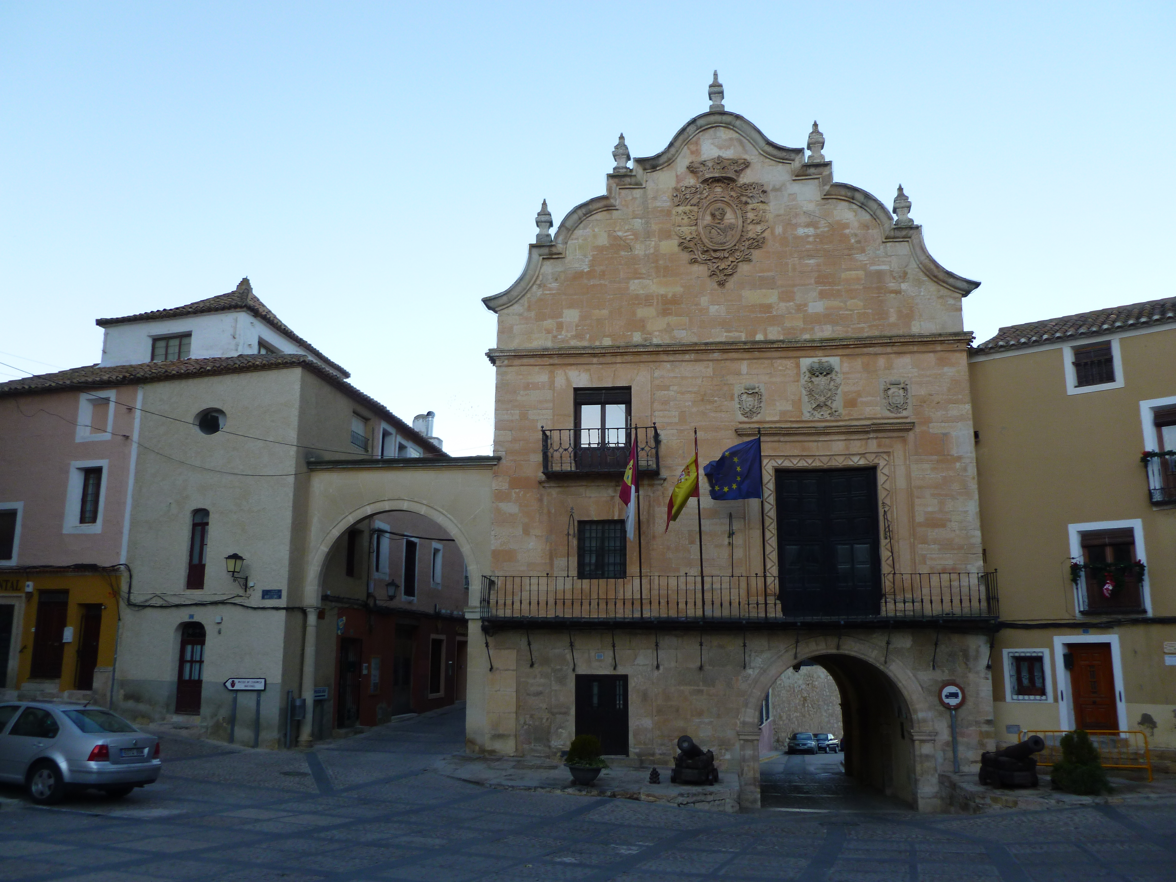 Plaza de La Mancha, en Chinchilla de Montearagón (España).